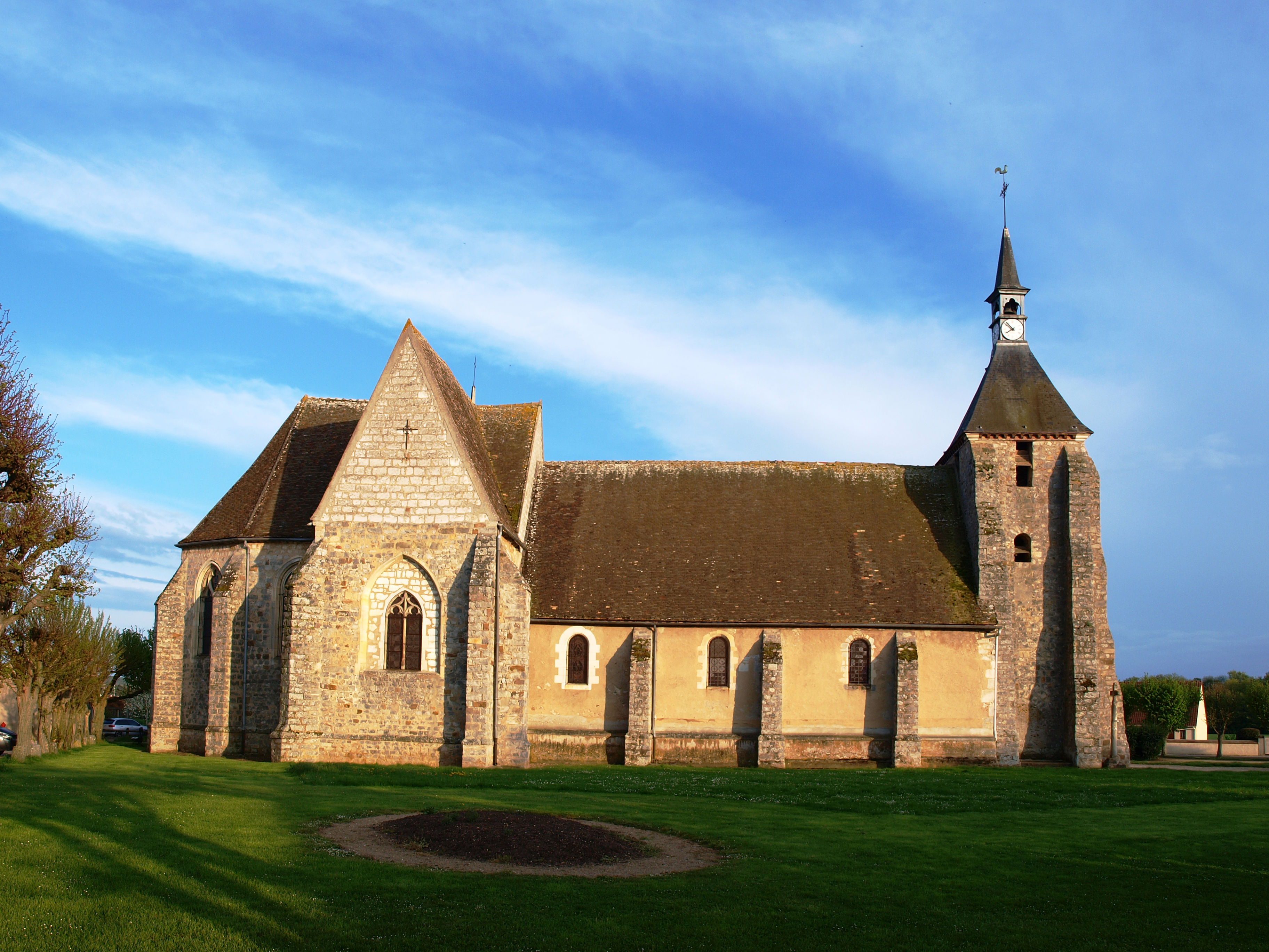 Serbonnes (Yonne, France) ; l'église Saint-Victor